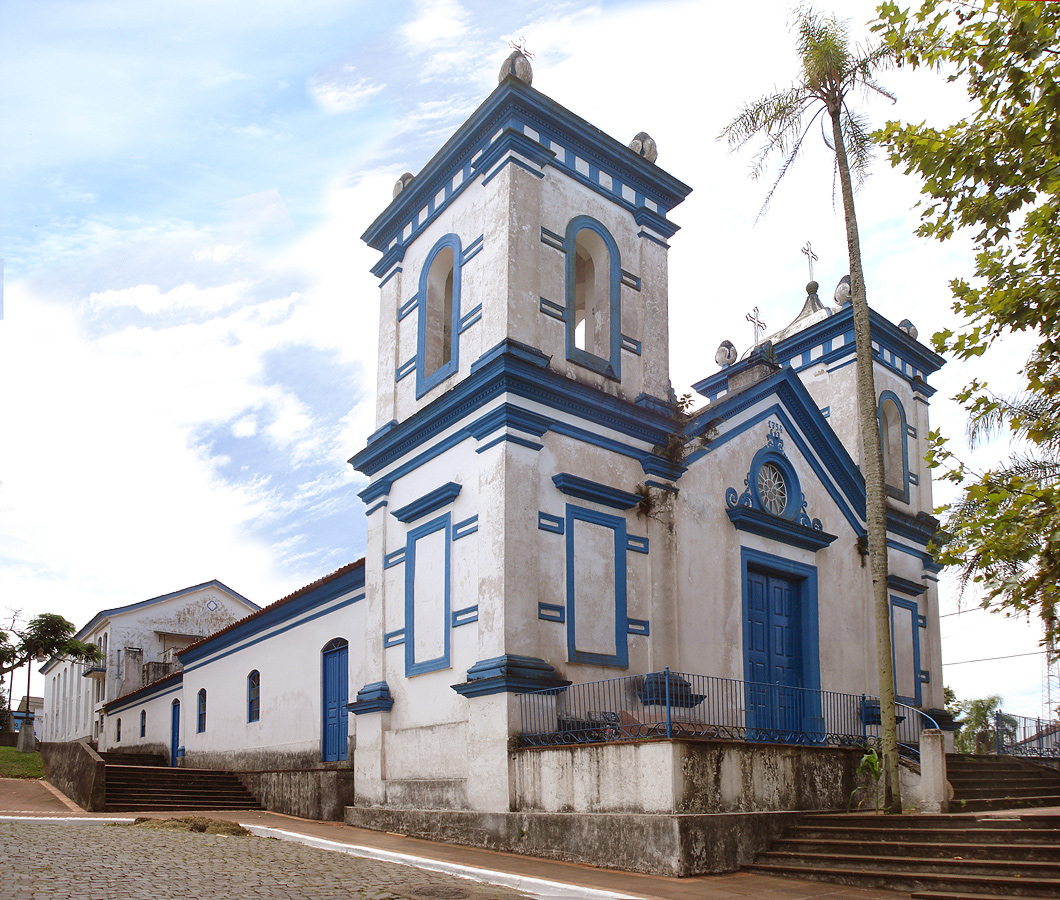 Igreja Bom Jesus (1754) em Triunfo, Rio Grande do Sul, Brasil.